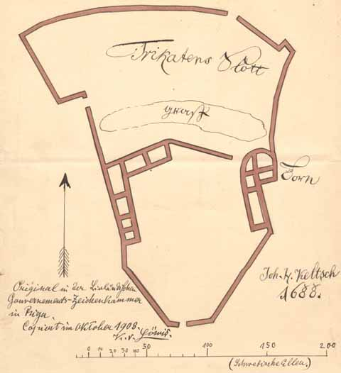 Karl Löwis of Menari koopia Rootsi Trikata 1688 a. lossiplaanist.